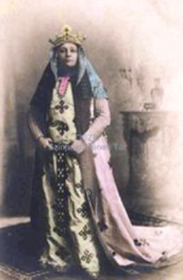 Jászai Mari mint Gertrudis. Nemzeti Színház. 1872. április 3-án játszotta először Jászai Mari – akkor még Kassainé – Gertrudis szerepét a Nemzeti Színházban.